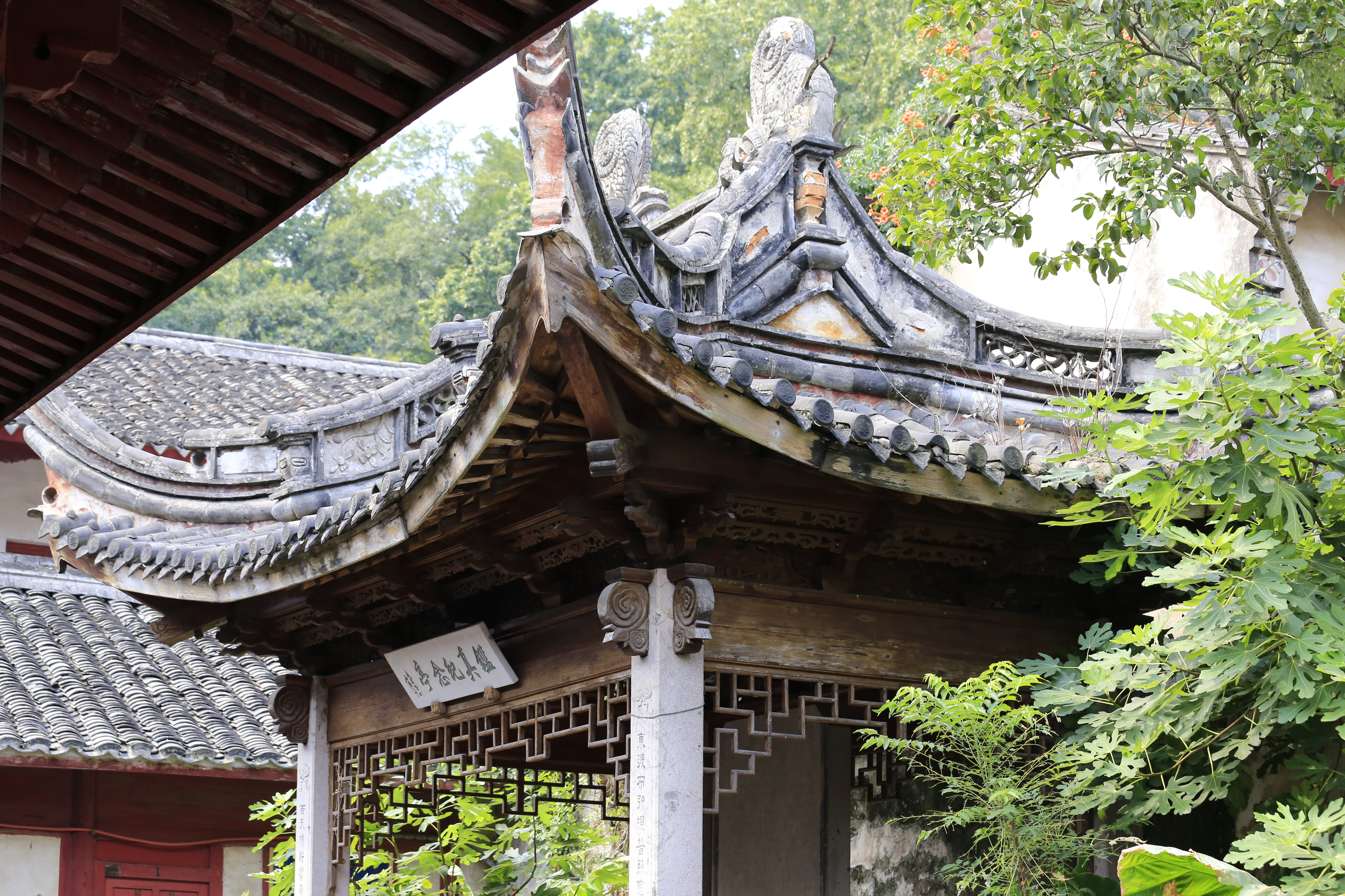 宁波阿育王寺 —— 鉴真纪念亭